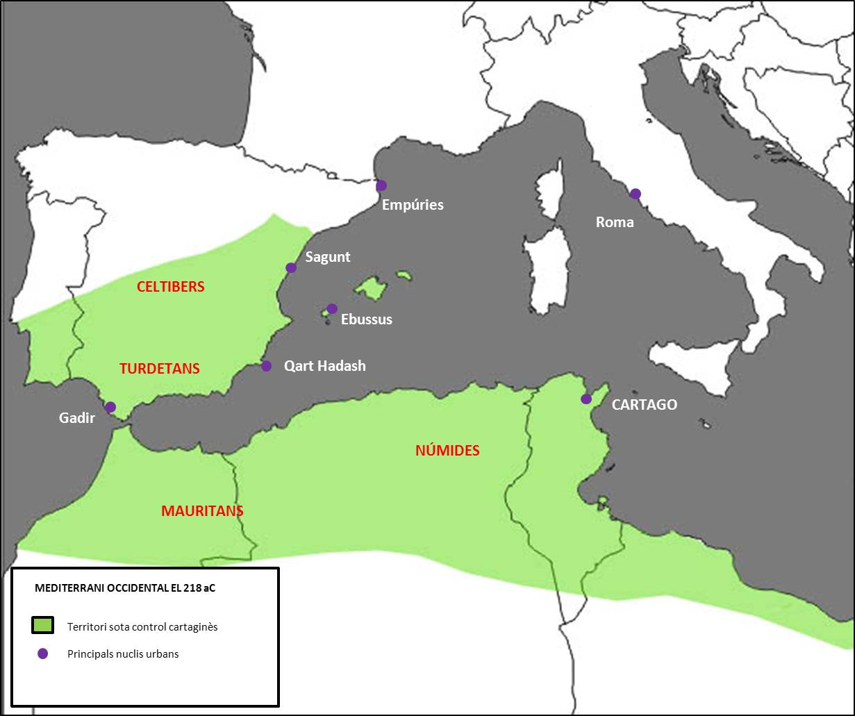 Situació política al Mediterrani occidental el 218 aC